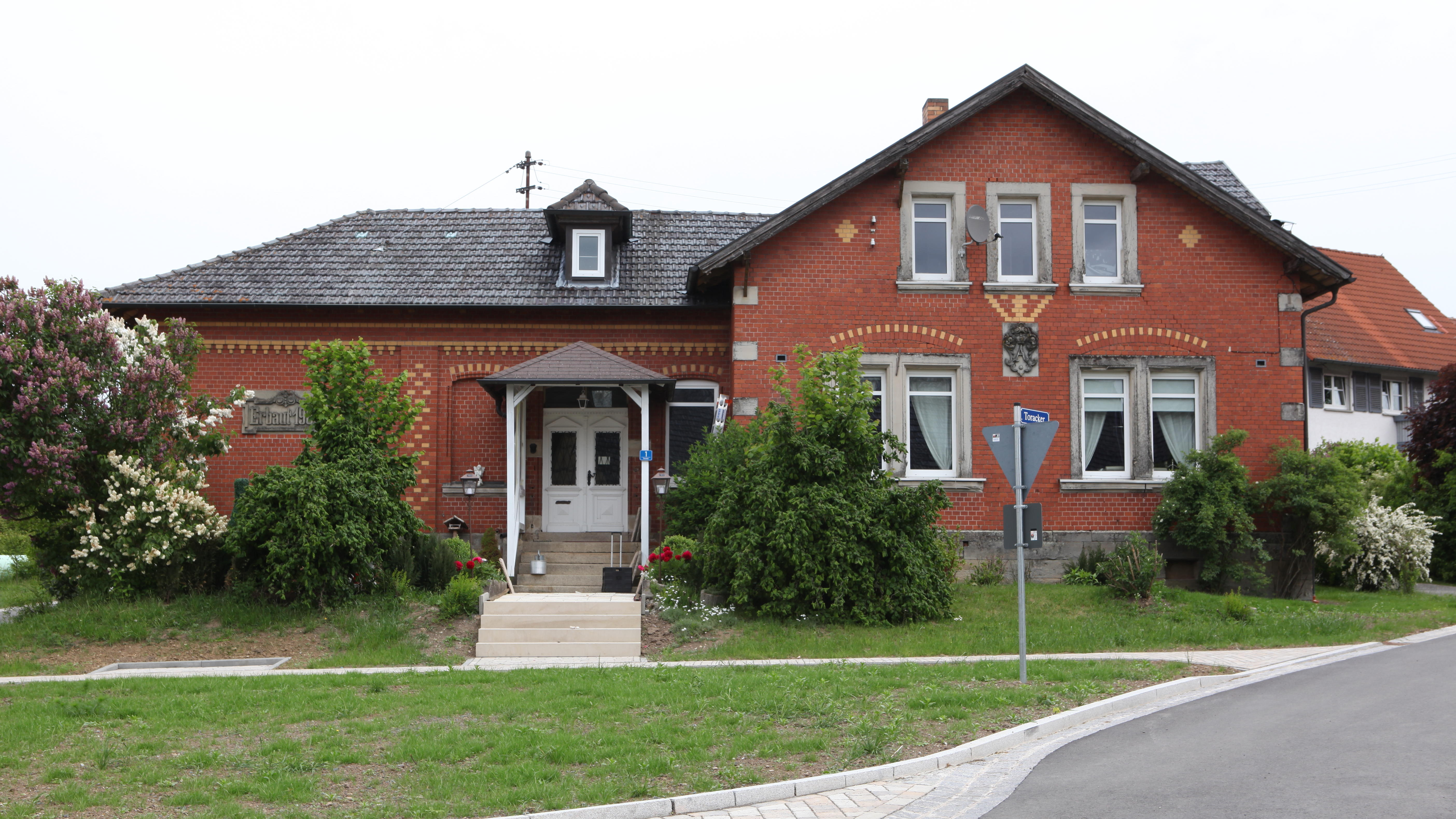 Ahlstadt, Alte Schule